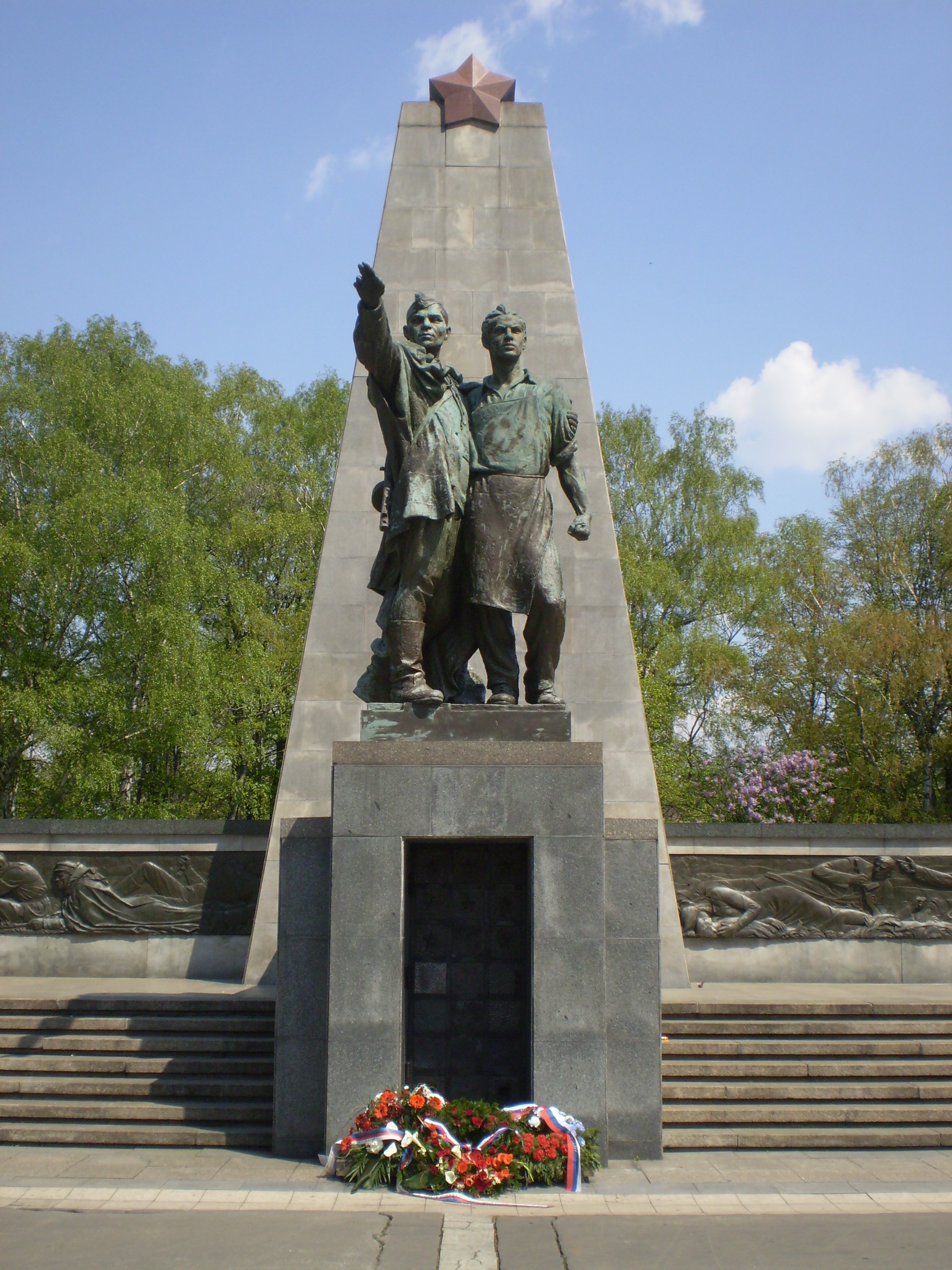 Památník v Komenského sadech v Ostravě.